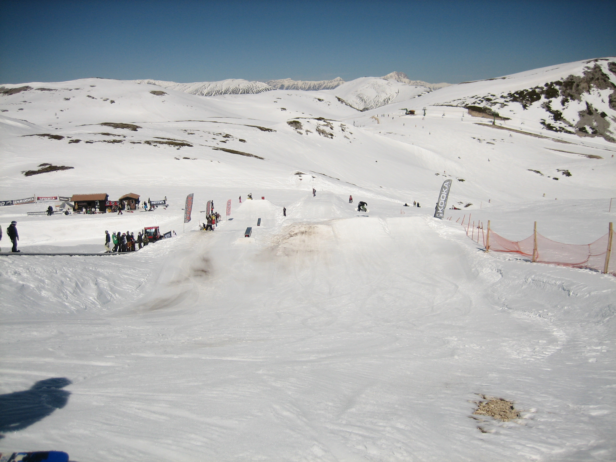 Alien Park